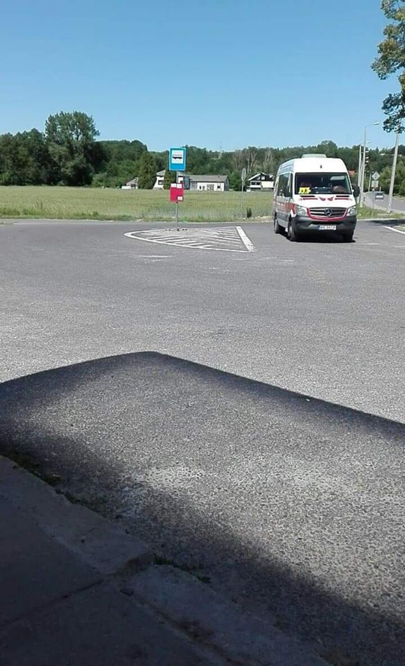 zajezdnia w Pliszczyn